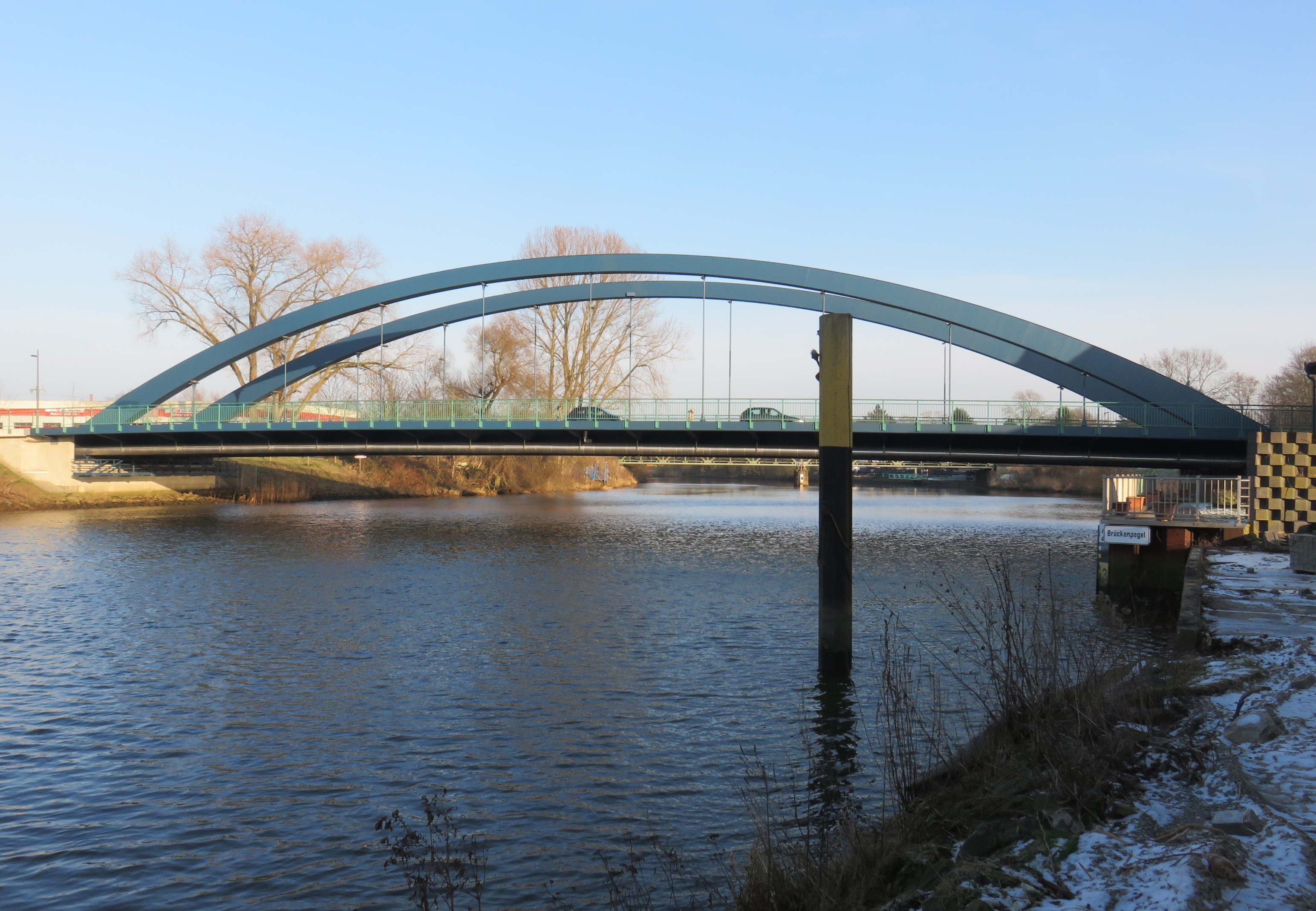 Die 2013 in Betrieb genommene neue Straßenbrücke über die Lesum